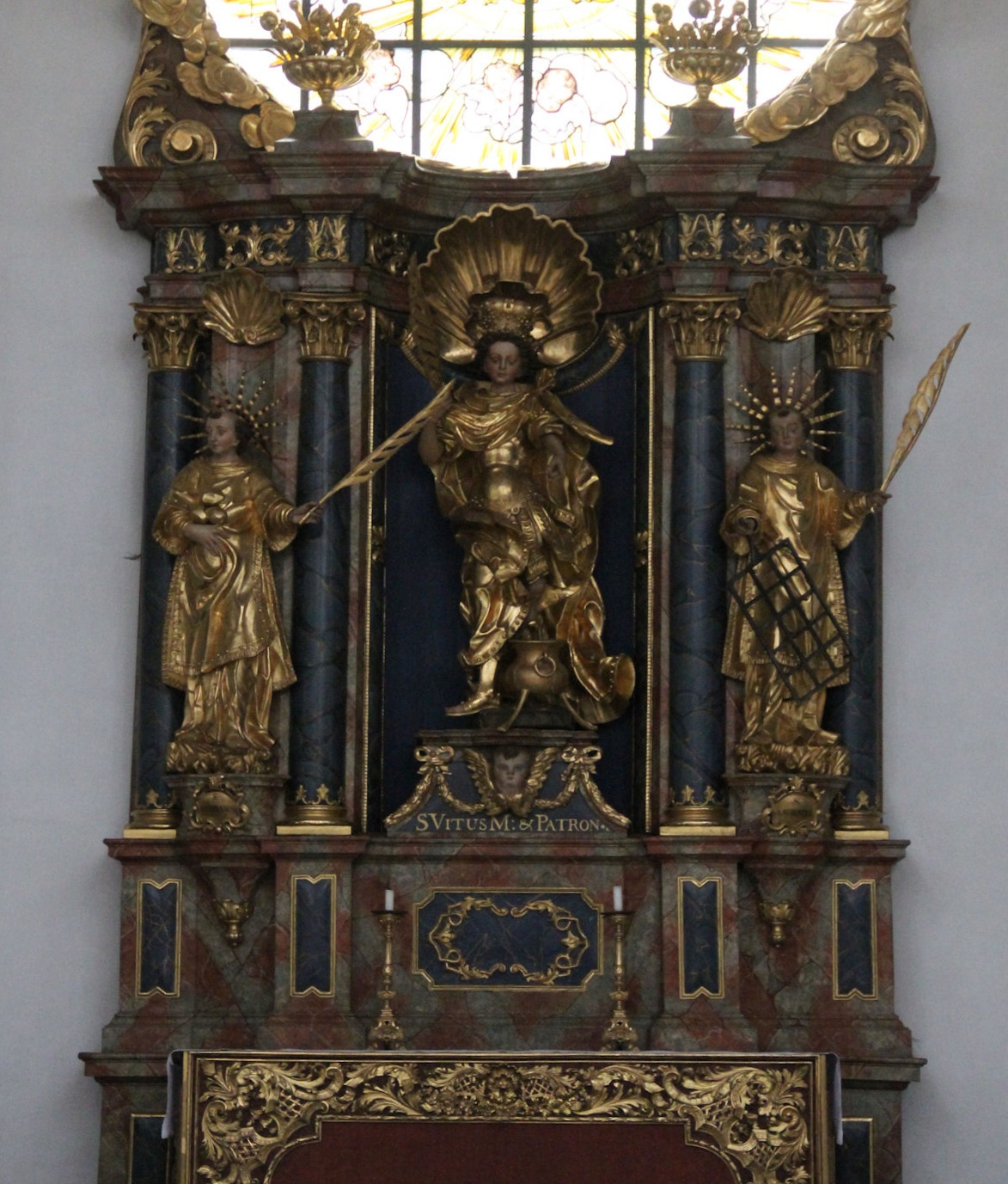 Landsberg am Lech, Stadtpfarrkirche Mariä Himmelfahrt, Vitusaltar.